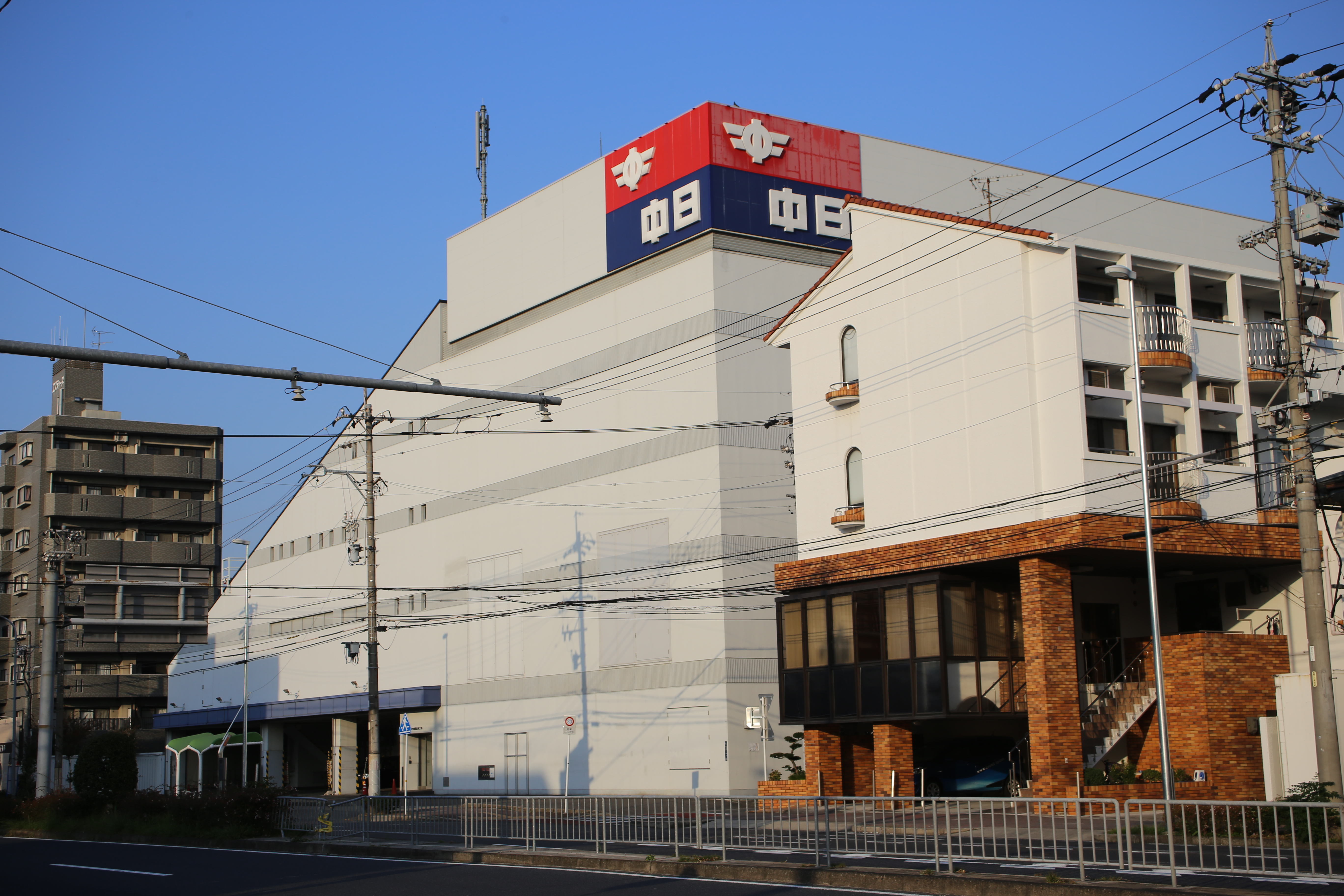 名古屋市北区の中日新聞金城工場